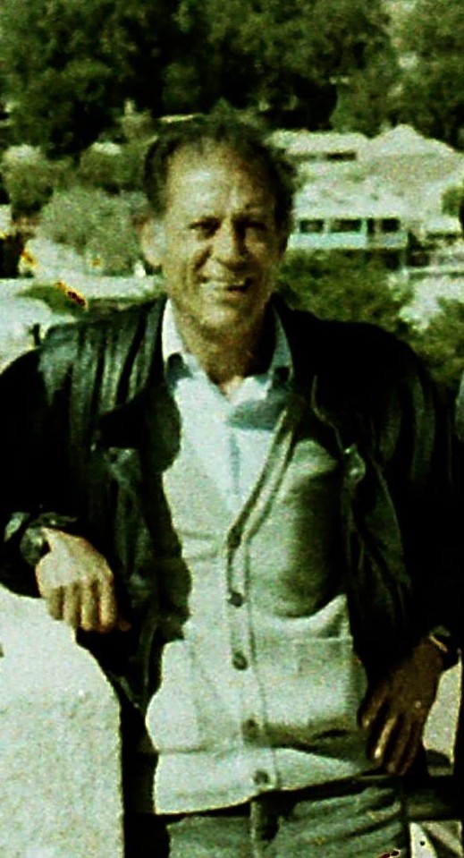 Filemón Escóbar en Congreso Minero, Tupiza, 1991